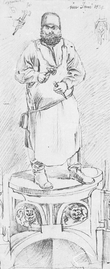 Detailskizze vom Sebaldusgrab in der Sebalduskirche zu Nürnberg: Selbstbildnis des Peter Vischer des Älteren, Skizze, Nürnberg, Germanisches Nationalmuseum, Graphische Sammlung, Hz 3112)